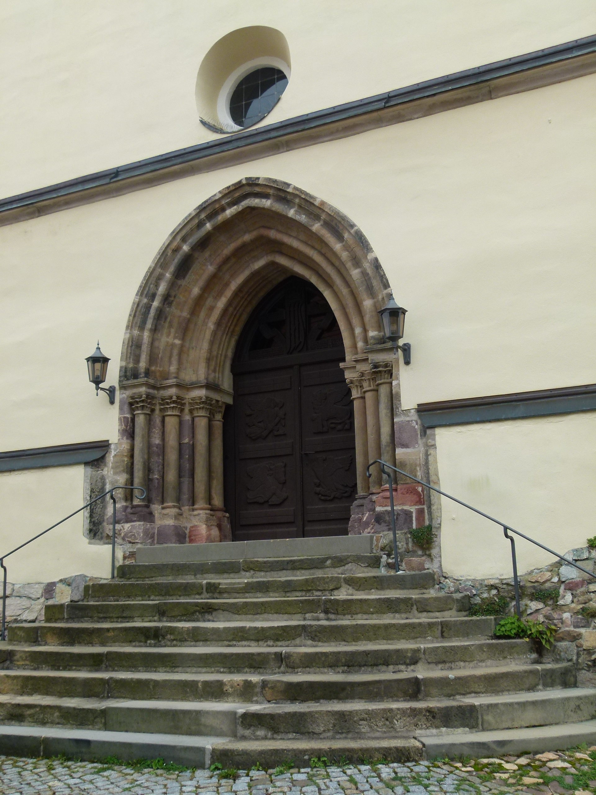 Kirche Nossen, Sachsen